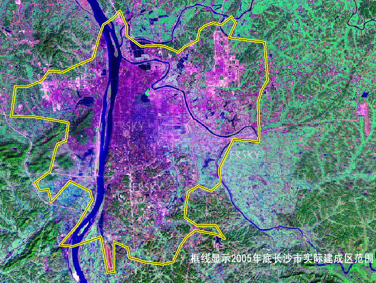 Changsha(CHN) Sat Img